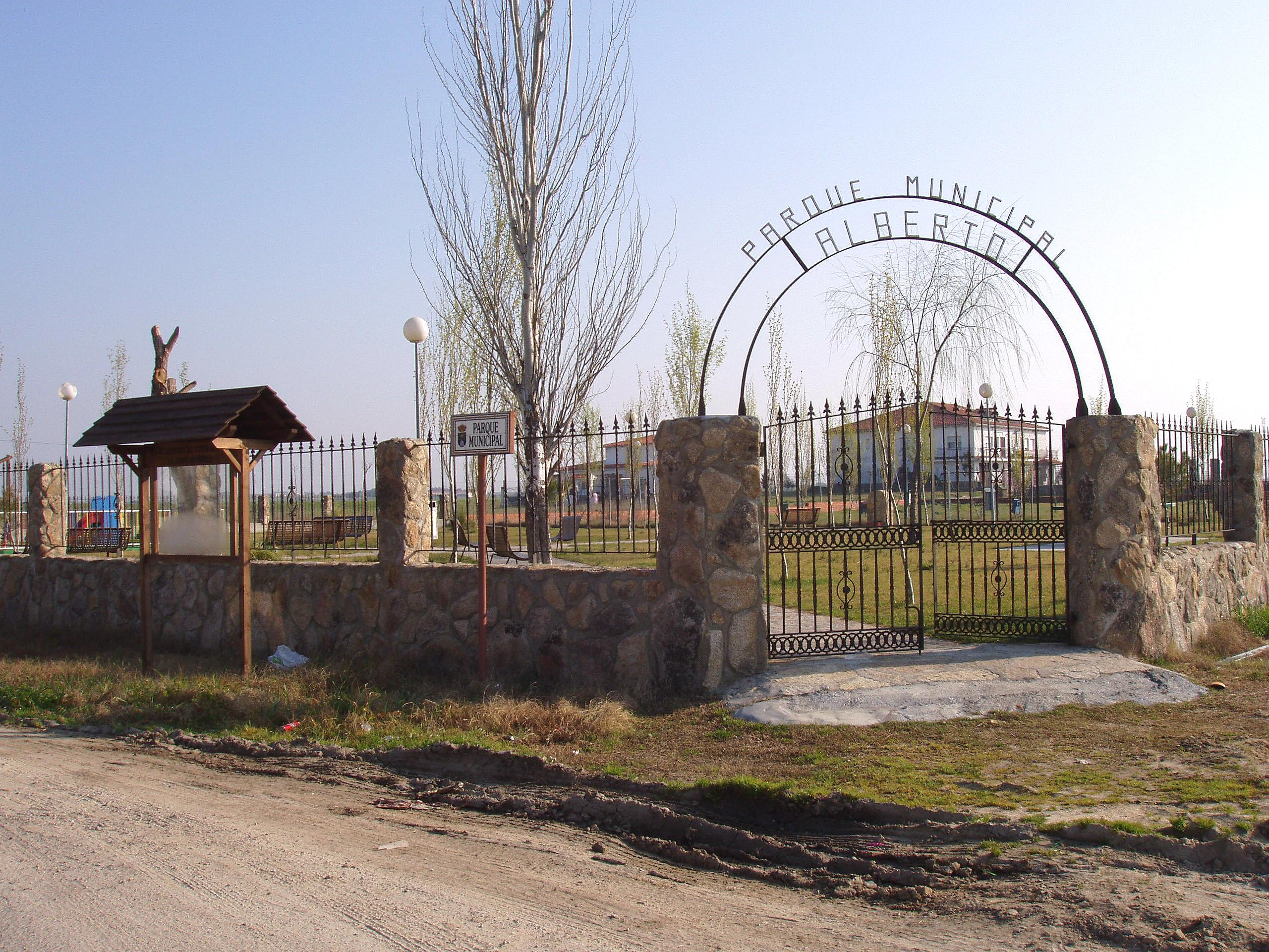 Parque municipal Alberto de Saucedilla